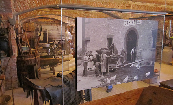 Vista della sezione "Strumenti" del Museo della civiltà contadina "Rodolfo e Luigi Sessa" a Mirabello di Ferrara